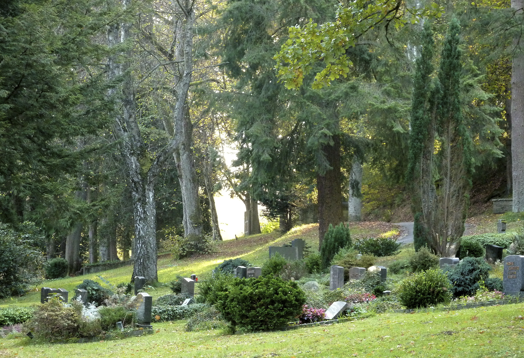 Stadt Siegen in Nordrhein-Westfalen, Bundesrepublik Deutschland: Der im Jahr 1912 eingerichtete Hermelsbacher Friedhof ist mit elf Hektar Grundfläche und rund 10.000 Grabstellen eine der größten Begräbnisstätten der Stadt. Das Foto zeigt ein Gräberfeld auf dem Friedhof